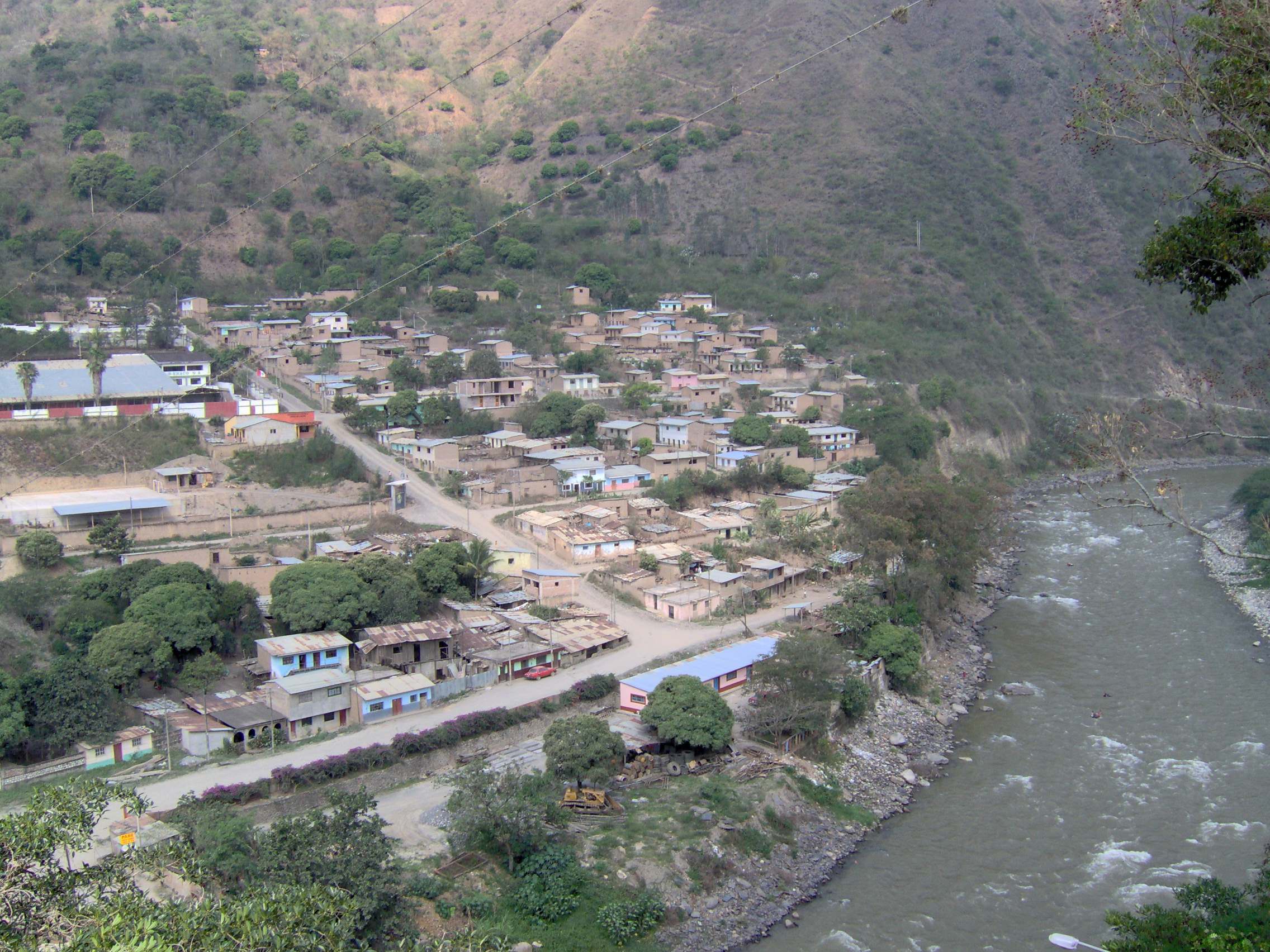 Detalles de la ciudad de Quillabamba, Cusco